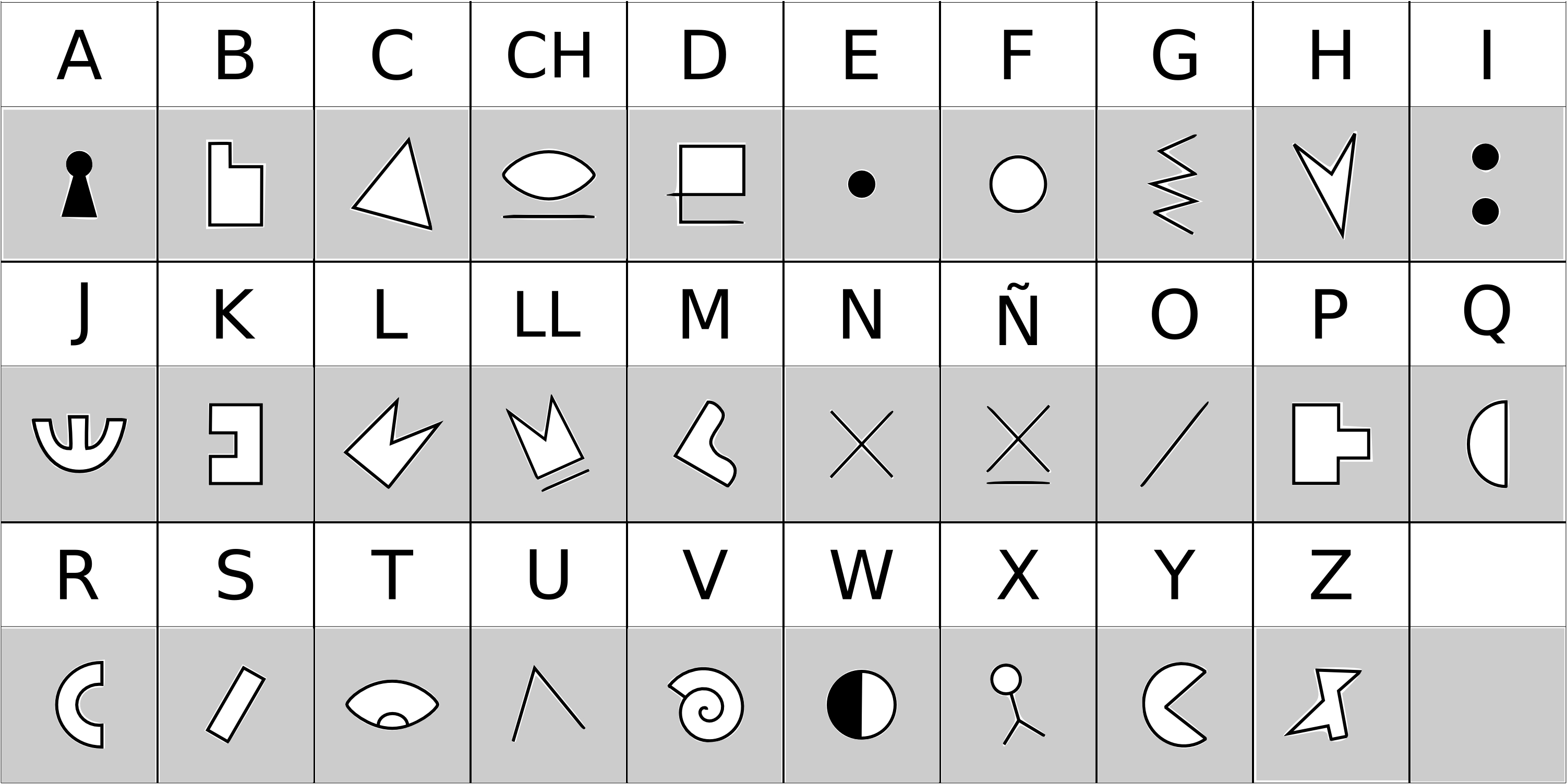 Tabla de correspondencia entre el alfabeto petiso y el alfabeto español. Al alfabeto petiso es utilizado por los petisos carambanales, criaturass del universo Superlópez